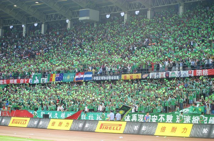 中文（中国大陆）: 北京工人体育场 国安主场Bân-lâm-gú: Pak-kiann Kang-lâng Thé-io̍k-tiûnn Kok-an tsú-tiûnn